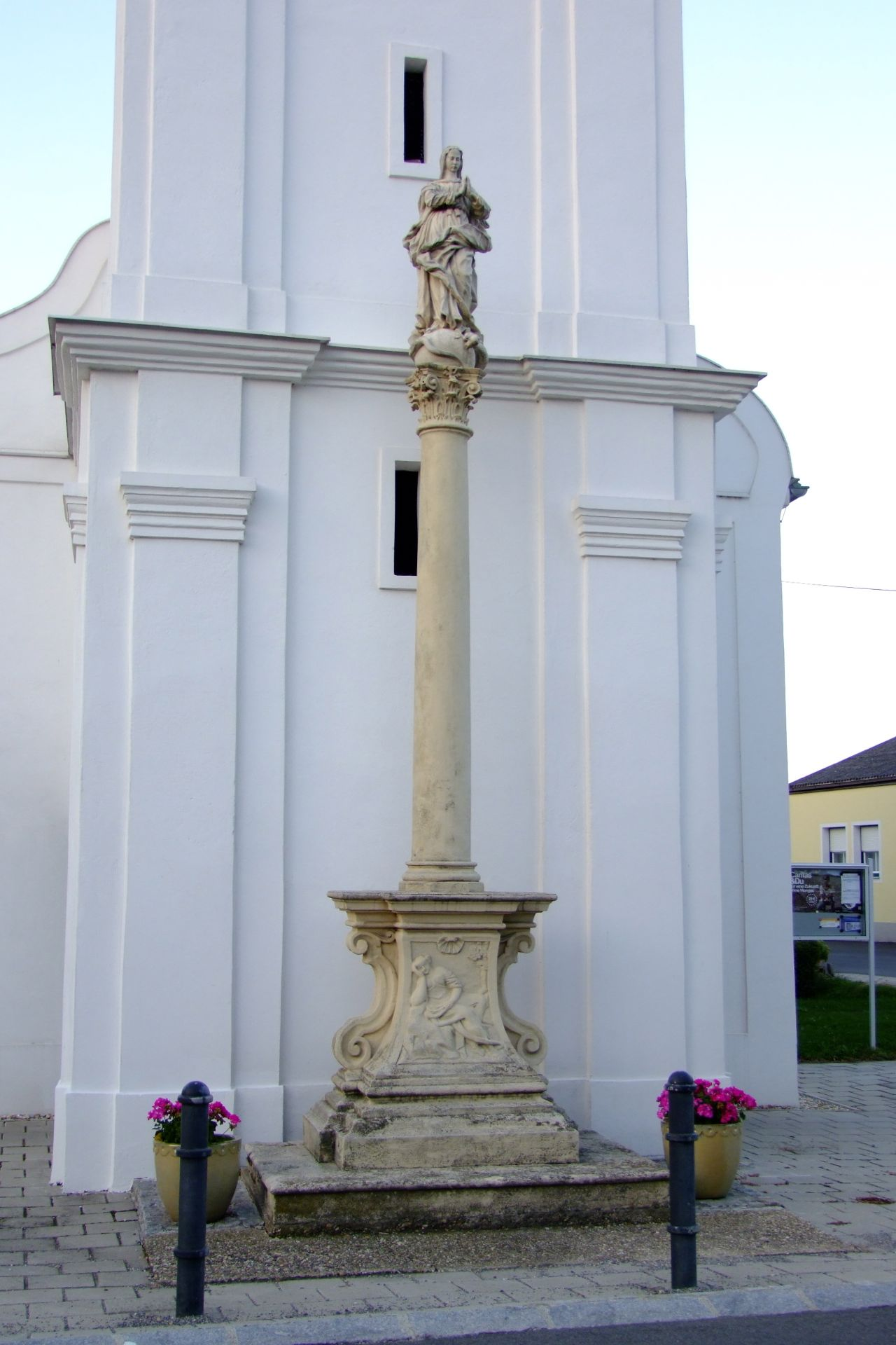 Immaculata- (Pest-)Säule